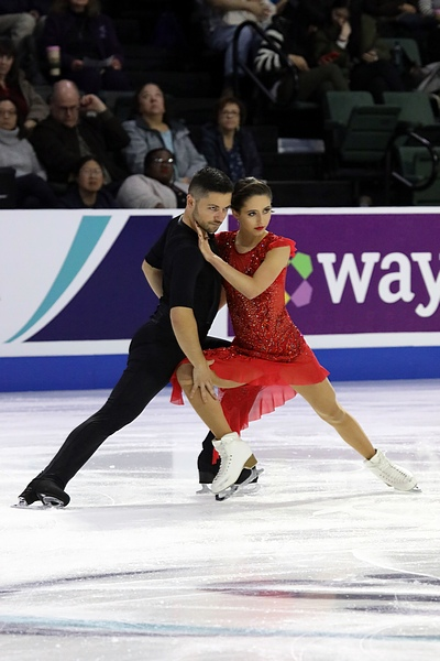 Лайла Фир и Льюис Гибсон на этапе Гран-при Skate America 2018